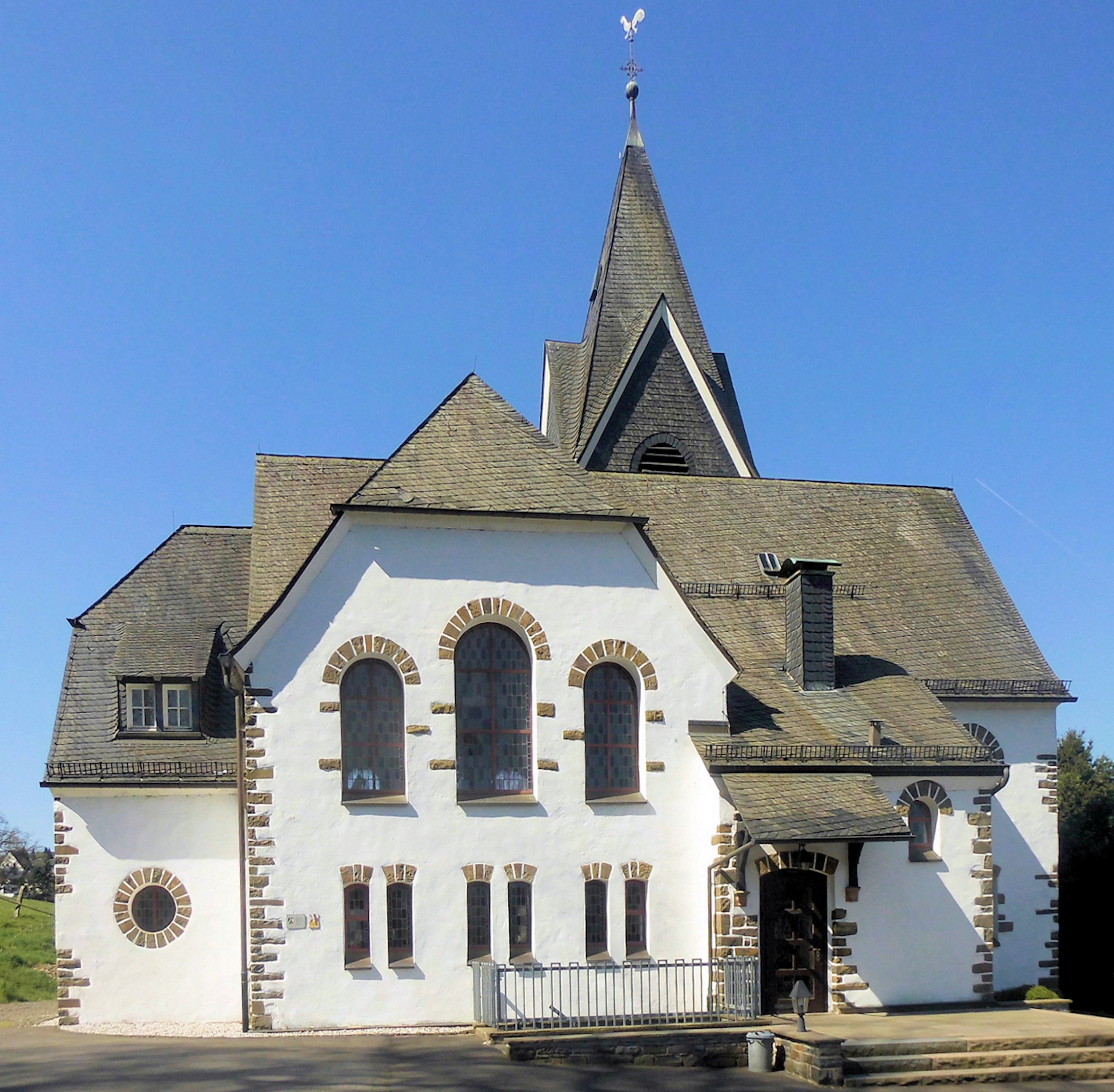 Evangelische Kirche in Volkenrath, Oberbergischer Kreis, Nordrhein-Westfalen, Deutschland